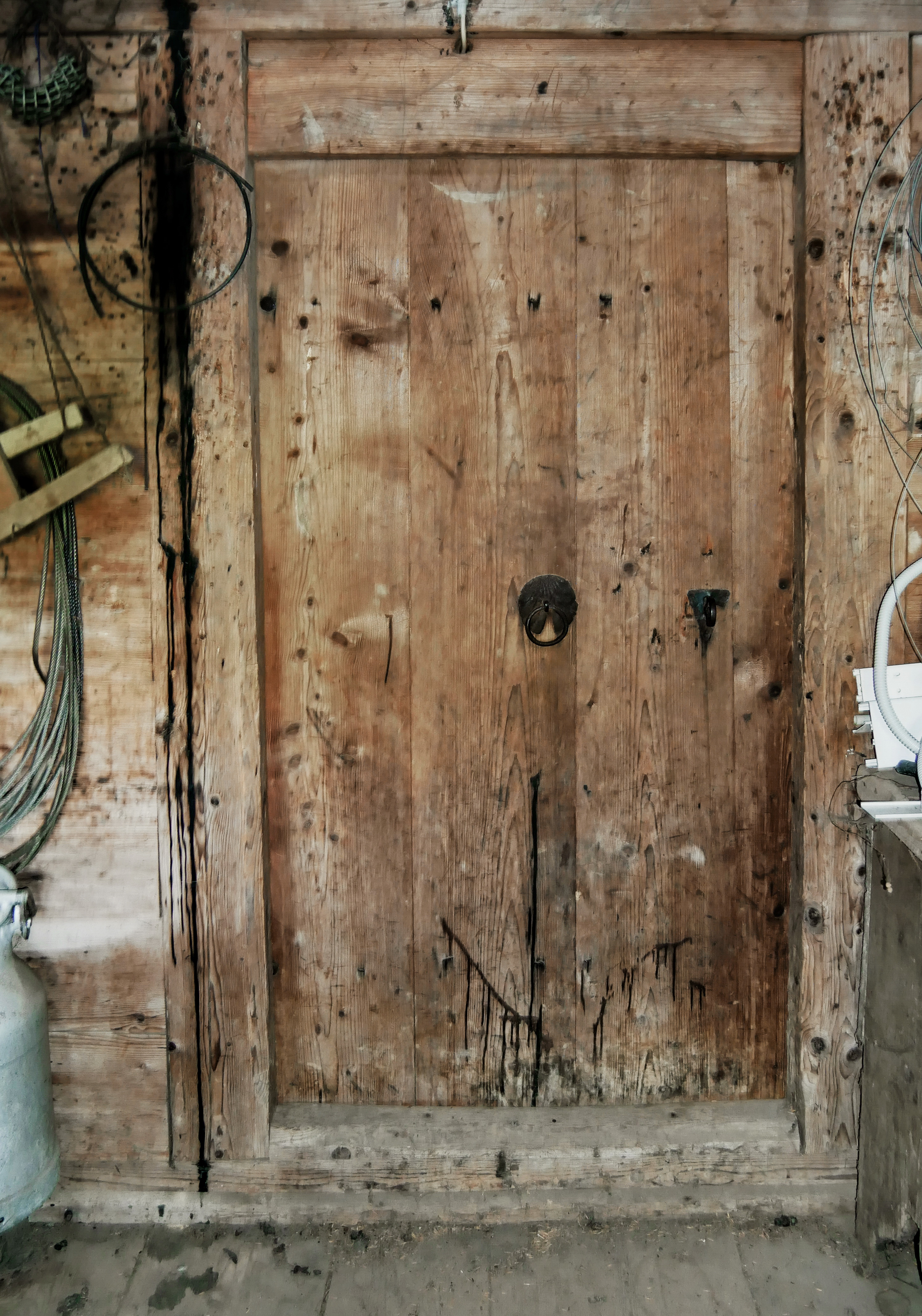 Steingaden, Ortsteil Unterengen, Unterengen 1: Eingang zum Getreidekasten